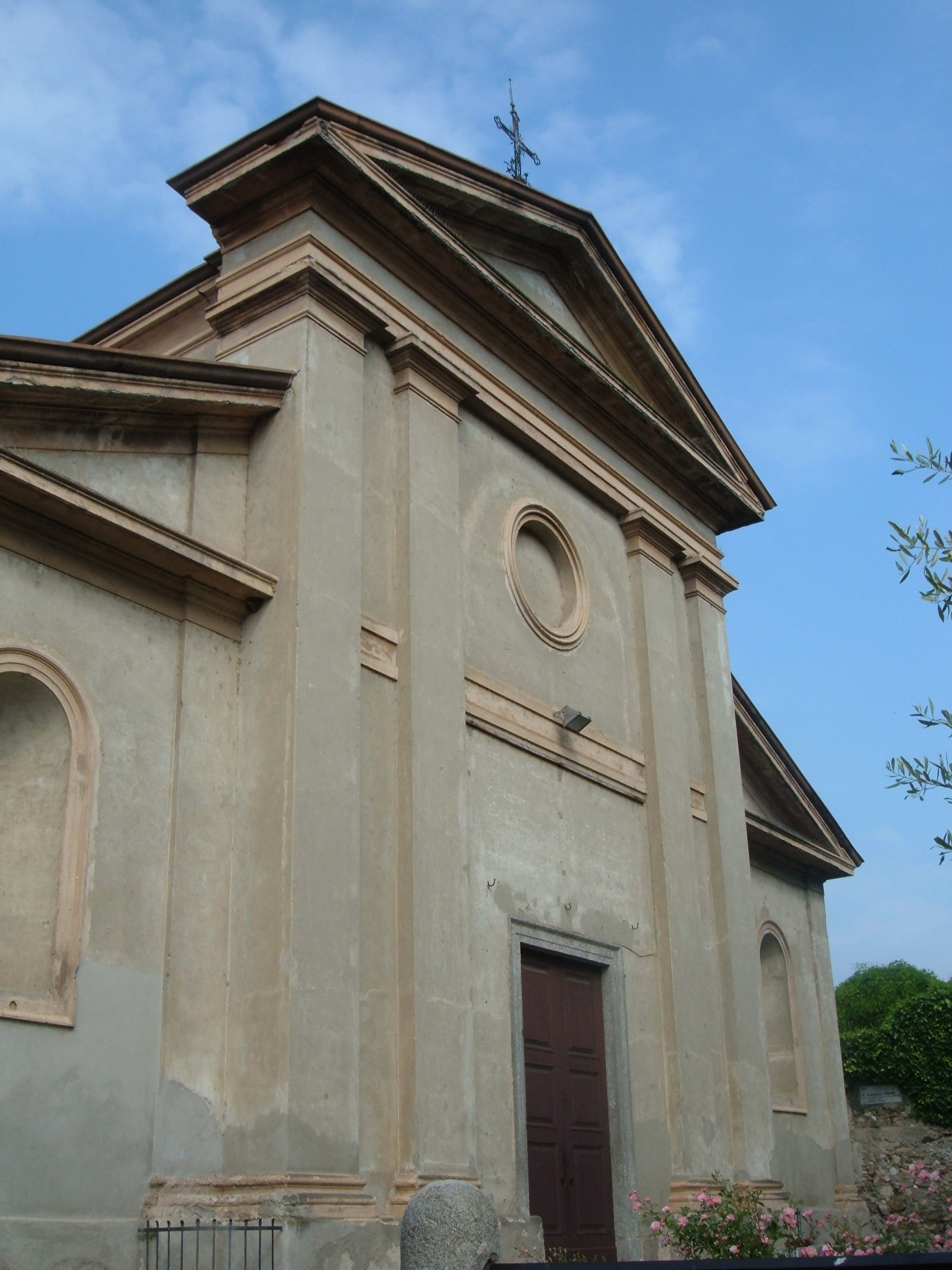 Chiesa di Santo Stefano a Garlate (prov. Lecco)